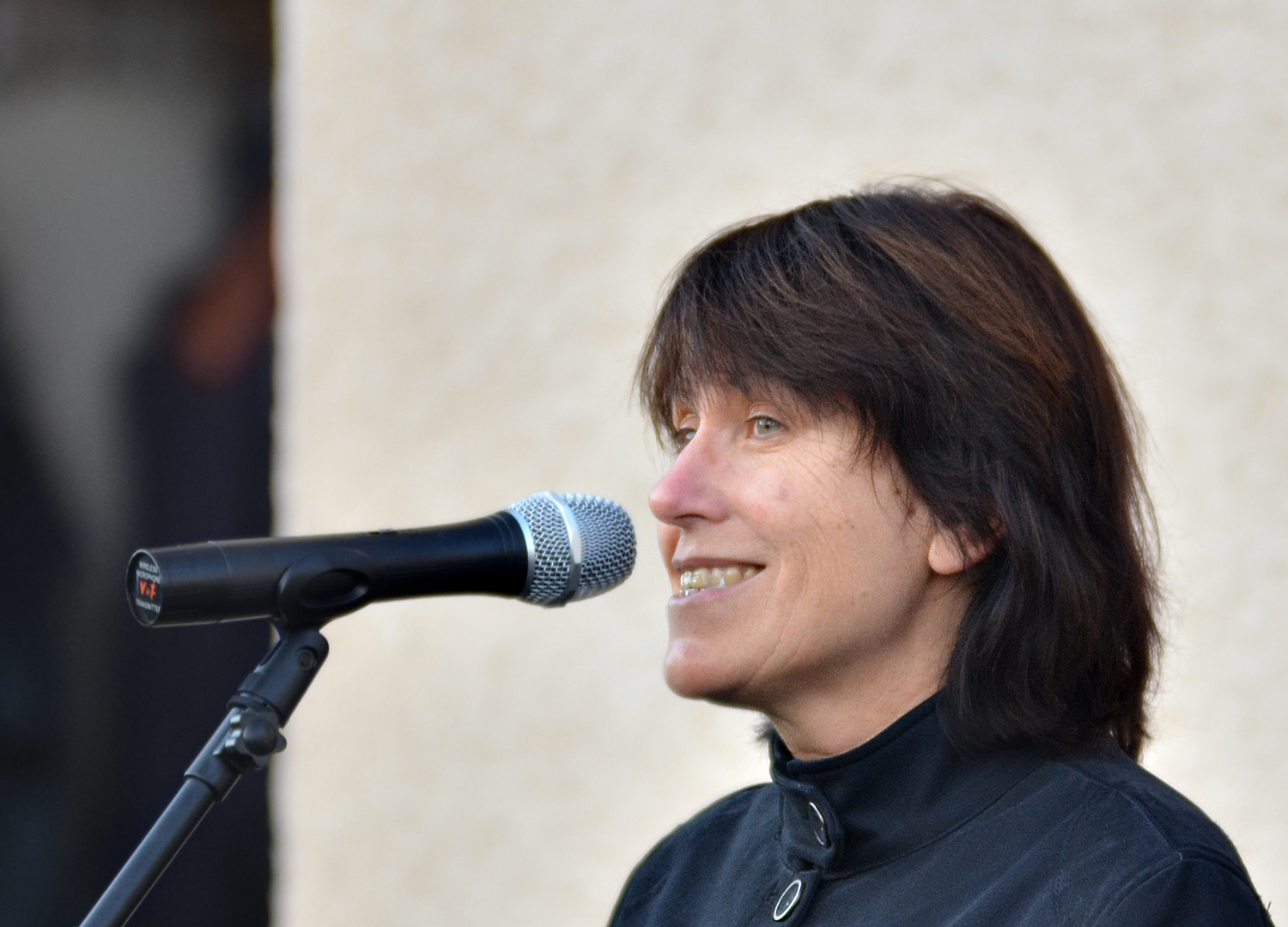 Pia Findeiß, Oberbürgermeisterin von Zwickau 2015 Camera data Camera Nikon D7000 Lens Tamron SP AF 70-200mm F/2,8 Di LD IF MACRO Focal length 200 mm Aperture f/2.8 Exposure time 1/400 s Sensivity ISO 320